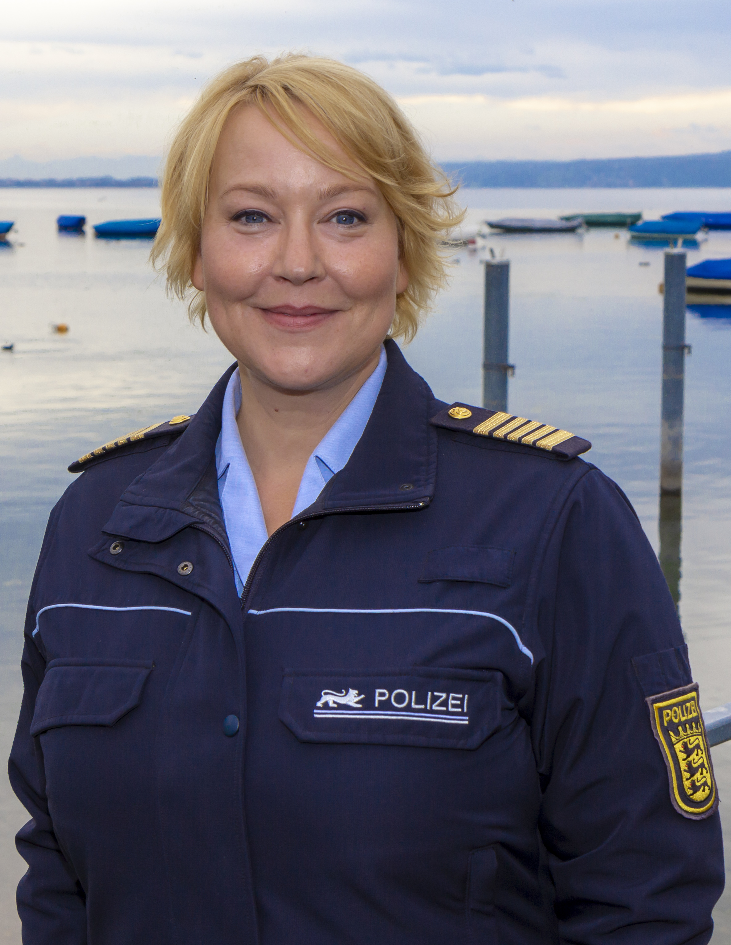 Floriane Daniel am Set von WaPo Bodensee am 15. Oktober 2019 in Radolfzell am Bodensee.